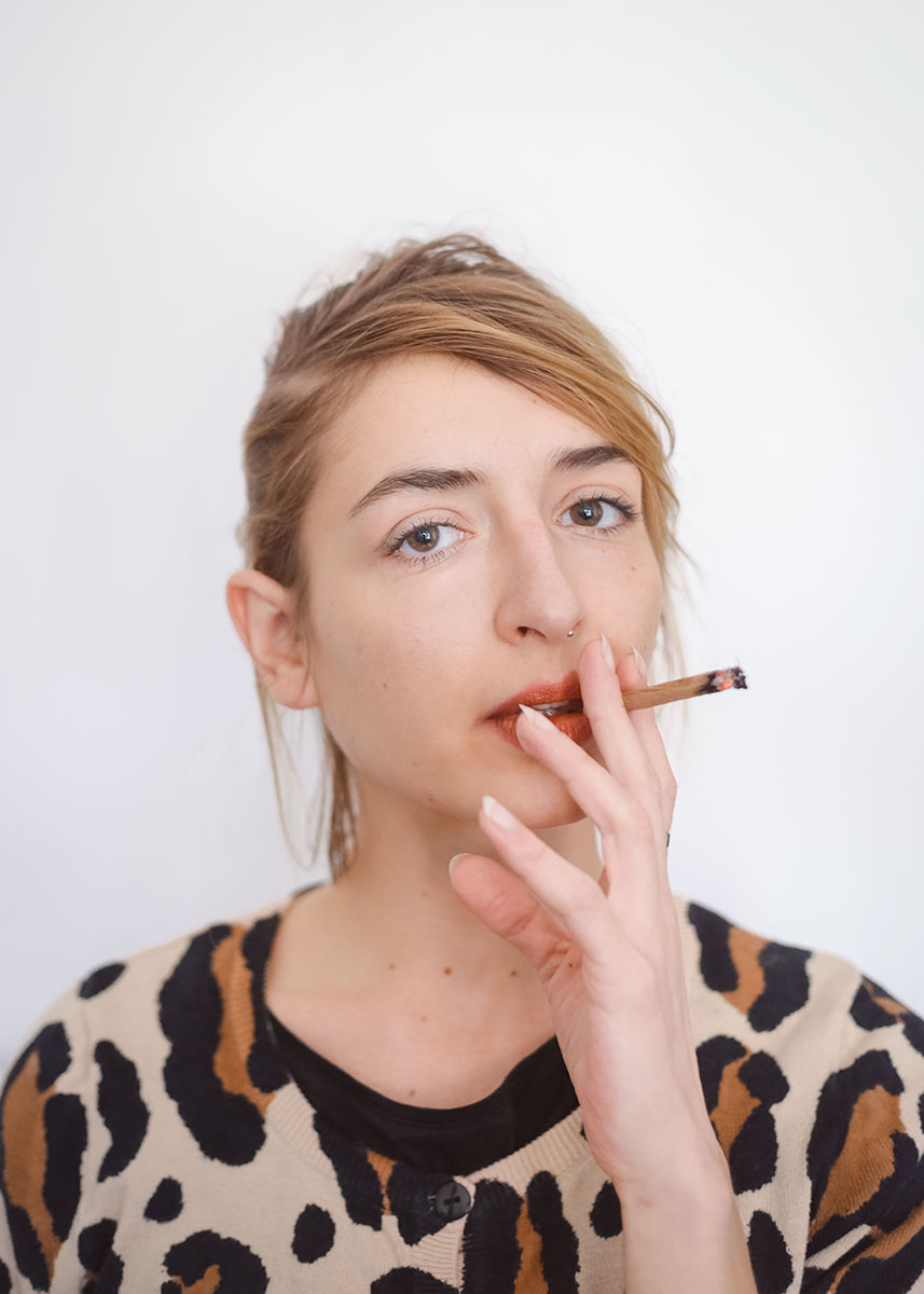 Ilona Witkowska, poetka.